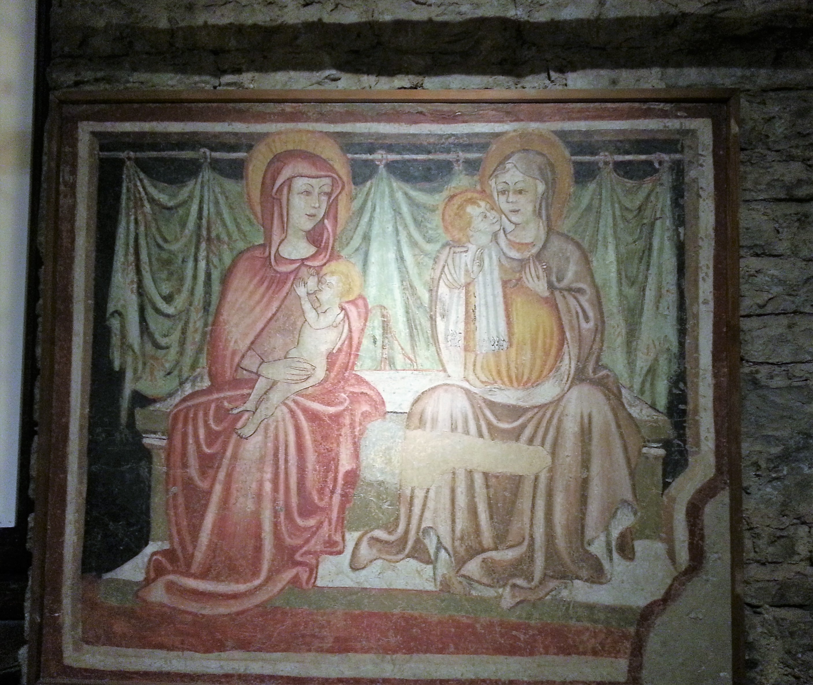 Affresco nella sala del tesoro della basilica di Santa Maria Maggiore